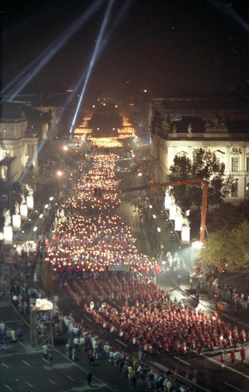 Berlin, 40. Jahrestag der DDR, Fackelzug ADN-ZB-Roeske-Berlin: 40.Jahrestag/ Fackelzug/ An historischer Stätte gratulierte die FDJ mit einem Fackelzug zwischen Brandenburger Tor und Marx-Engels-Platz der Deutschen Demokratischen Republik zum 40. Jahrestag ihrer Betriebe, Genossenschaften, Einrichtungen und Schulen zu dieser Manifestation.